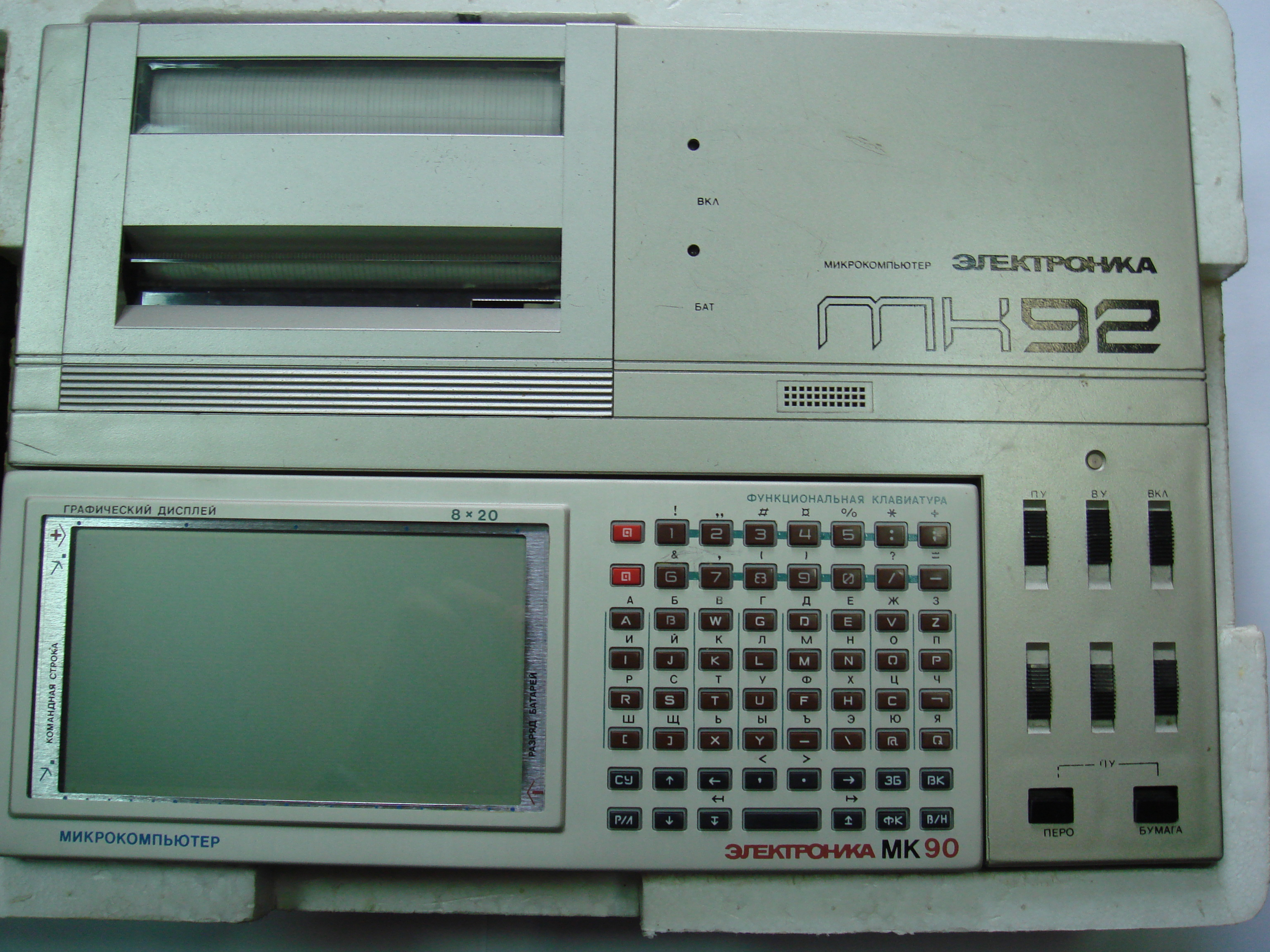 МК-92 с вставленным МК-90